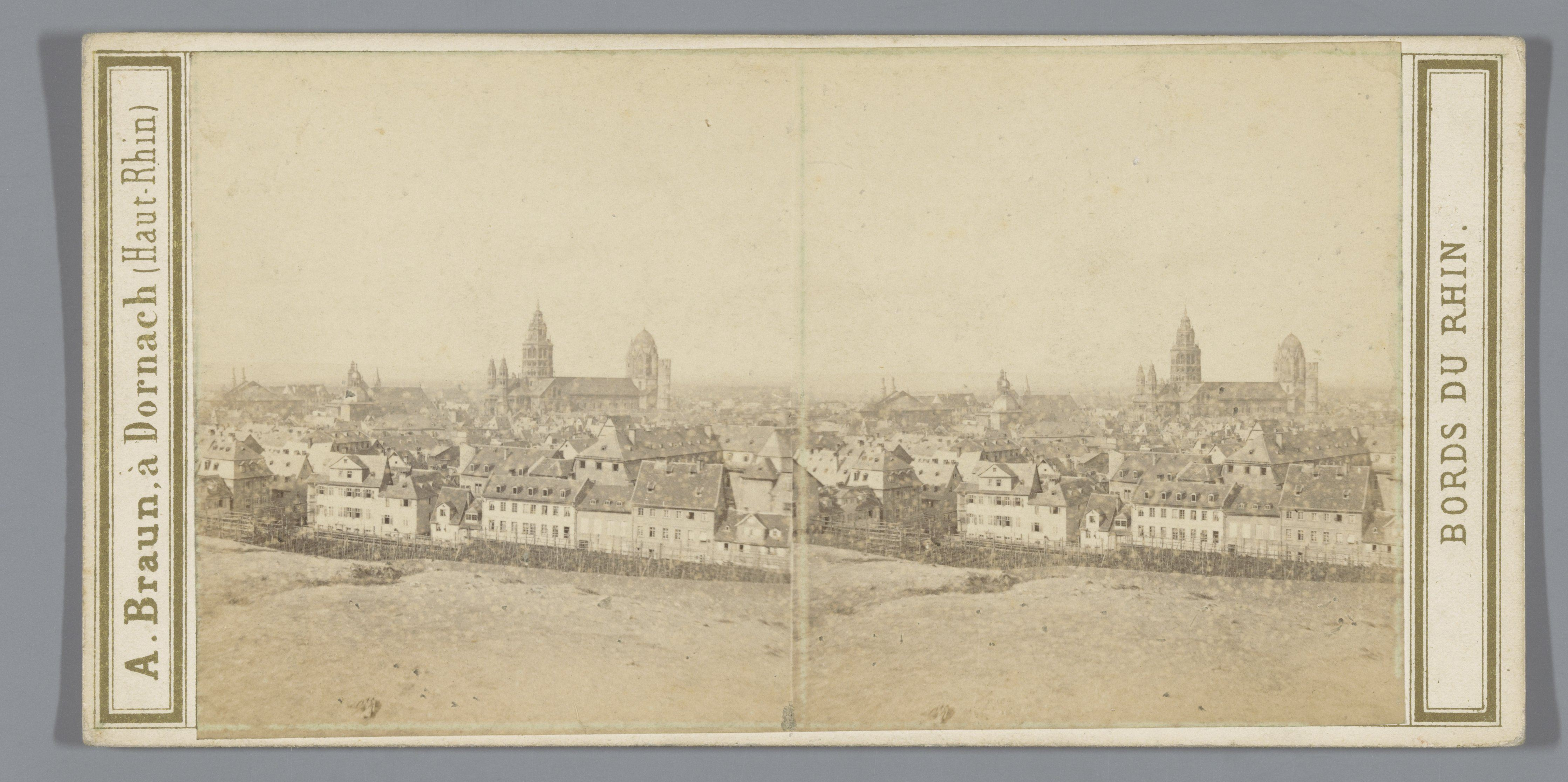 IdentificatieTitel(s): Gezicht op Mainz. In de verte de Dom van MainzVue prise de la Windmühle (titel op object)Mayence (serietitel op object)Bords du Rhin (serietitel op object)Objecttype: stereofoto Objectnummer: RP-F-F13868Opschriften / Merken: nummer, verso, gedrukt: ‘No 2526.’Omschrijving: De Dom draagt hier nog een gewelfde smeedijzeren koepel op een van de torens, bekend als het 'Mollerschen ei' naar architect Georg Moller.VervaardigingVervaardiger: fotograaf: anoniemuitgever: Adolphe Braun et Cie (vermeld op object)Plaats vervaardiging: fotograaf: Mainzuitgever: DornachDatering: 1860 - 1866Materiaal: karton fotopapier Techniek: albuminedrukAfmetingen: secundaire drager: h 85 mm × b 175 mmOnderwerpWat: city-view in general; 'veduta'Roman Catholic ChurchWaar: MainzDom van MainzVerwerving en rechtenVerwerving: overdracht van beheer 1994Copyright: Publiek domein